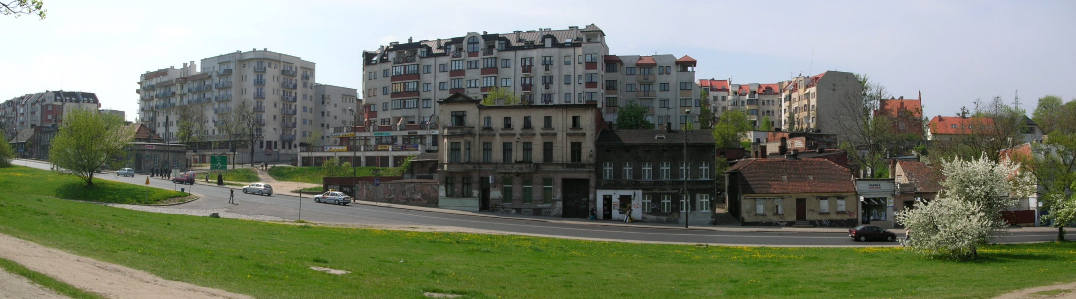 Ulica Kujawska w Bydgoszczy